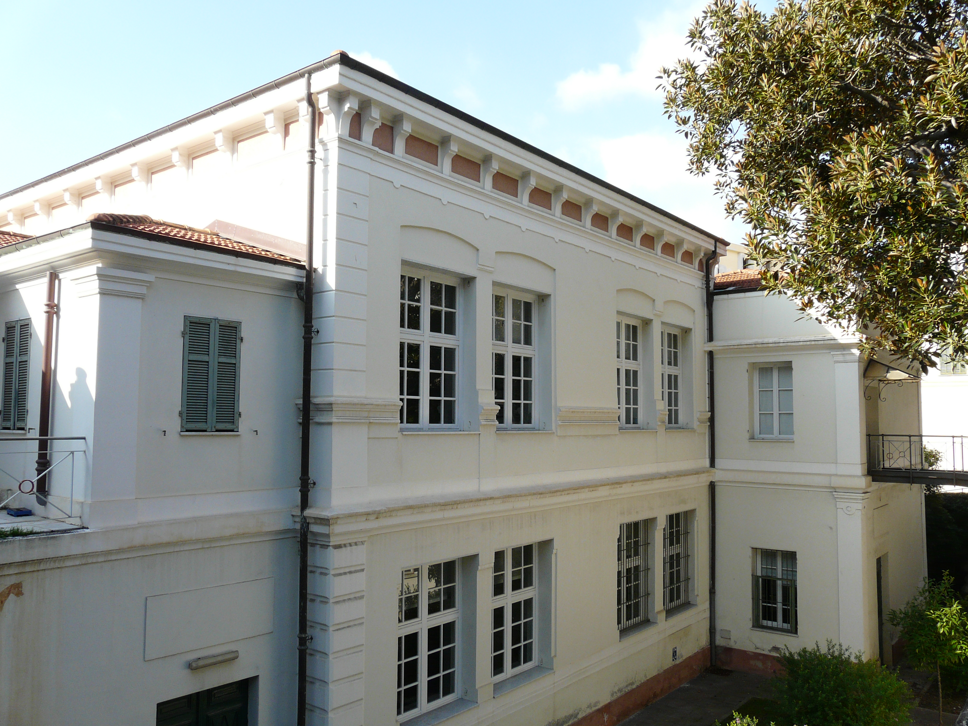 Municipio di Bordighera, Liguria, Italia